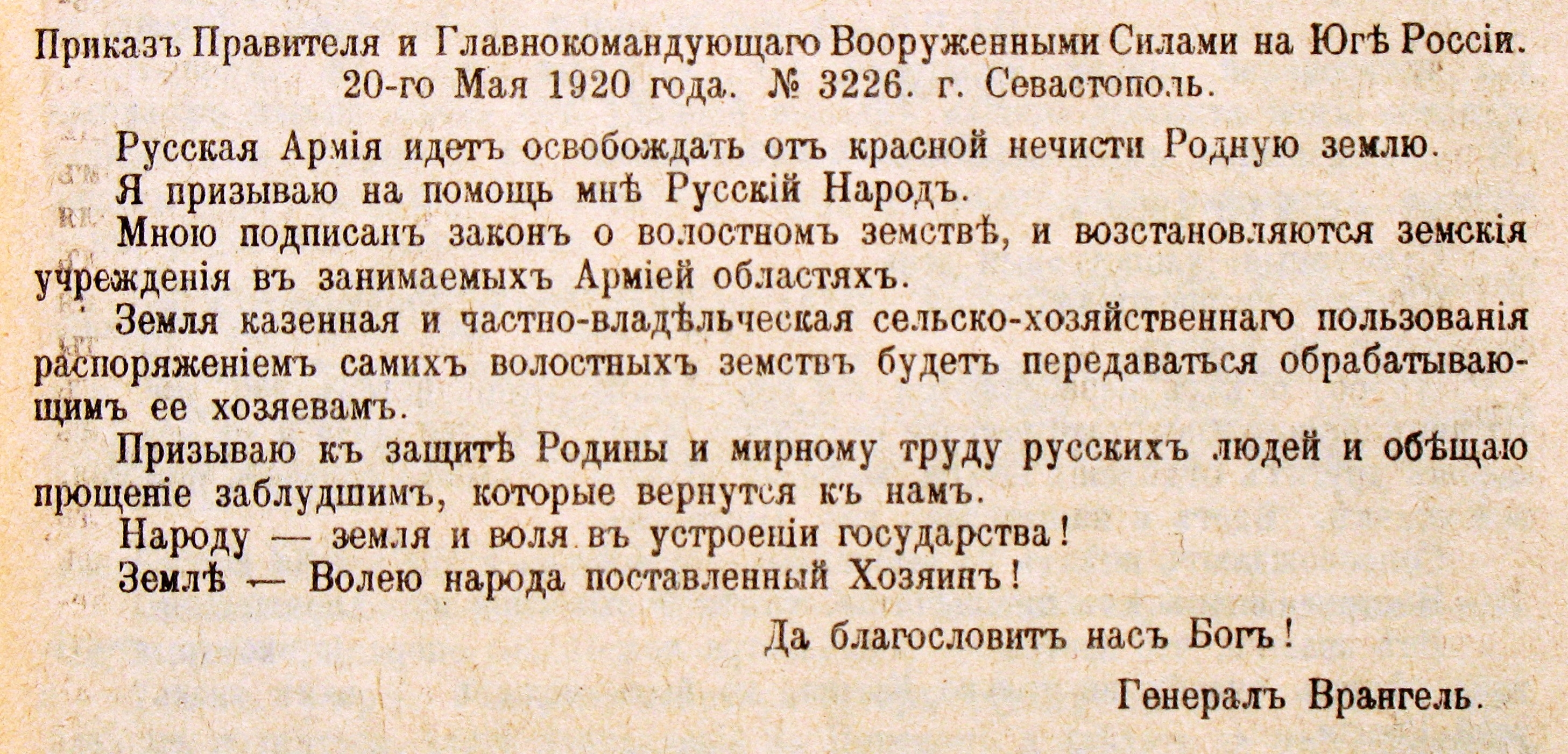 "Русская Армия идет освобождать от красной нечисти Родную землю..." Приказ Главнокомандующаго Вооруженными Силами на Юге России П. Н. Врангеля № 3226 от 20 мая 1920 года. г. Севастополь. Выпущен перед выходом белой Русской Армии из Крыма ( высадкой десанта ген. Слащова в Кирилловке ).